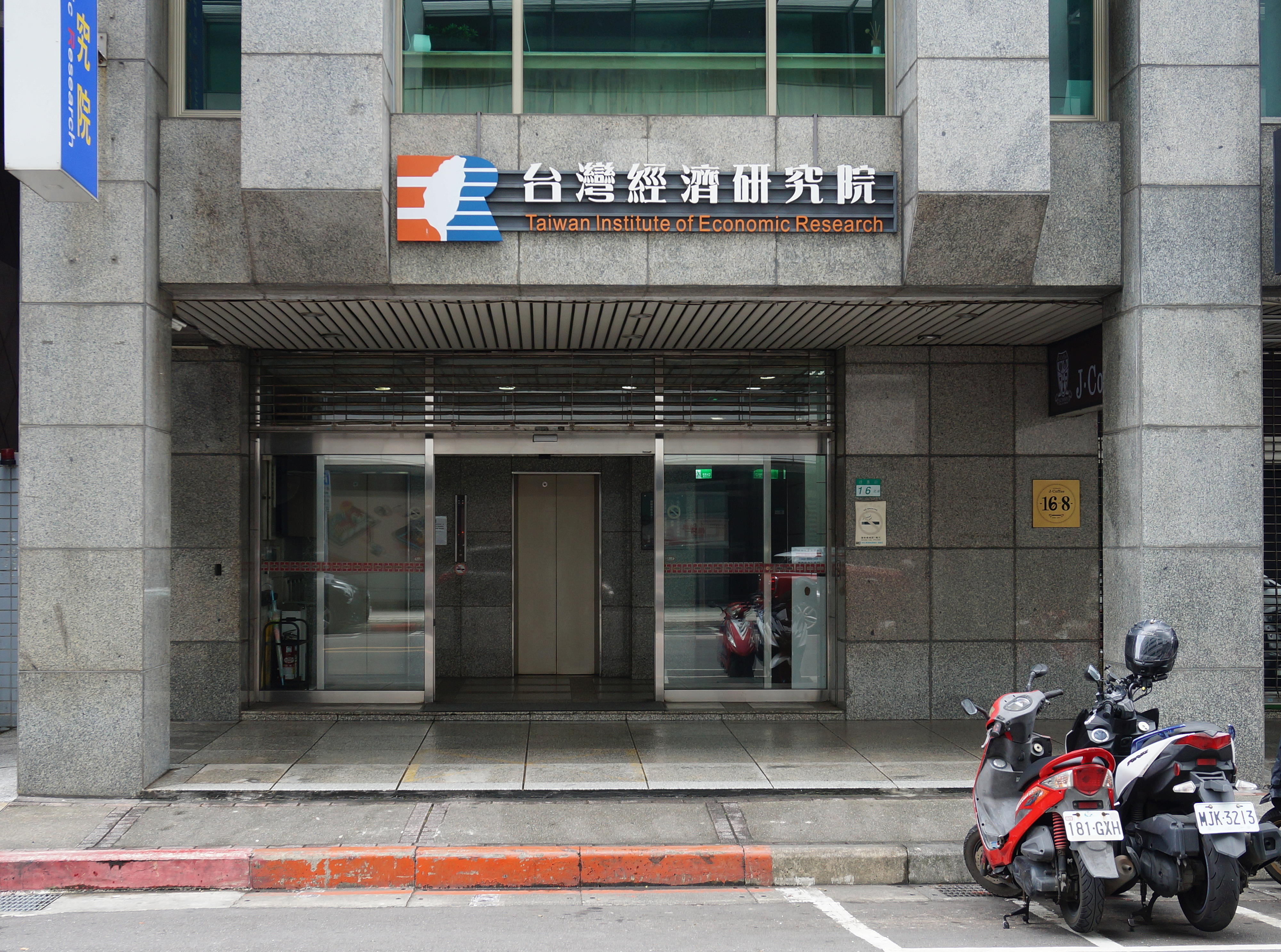 台灣經濟研究院總部，1996年遷至臺北市中山區德惠街16之8號。